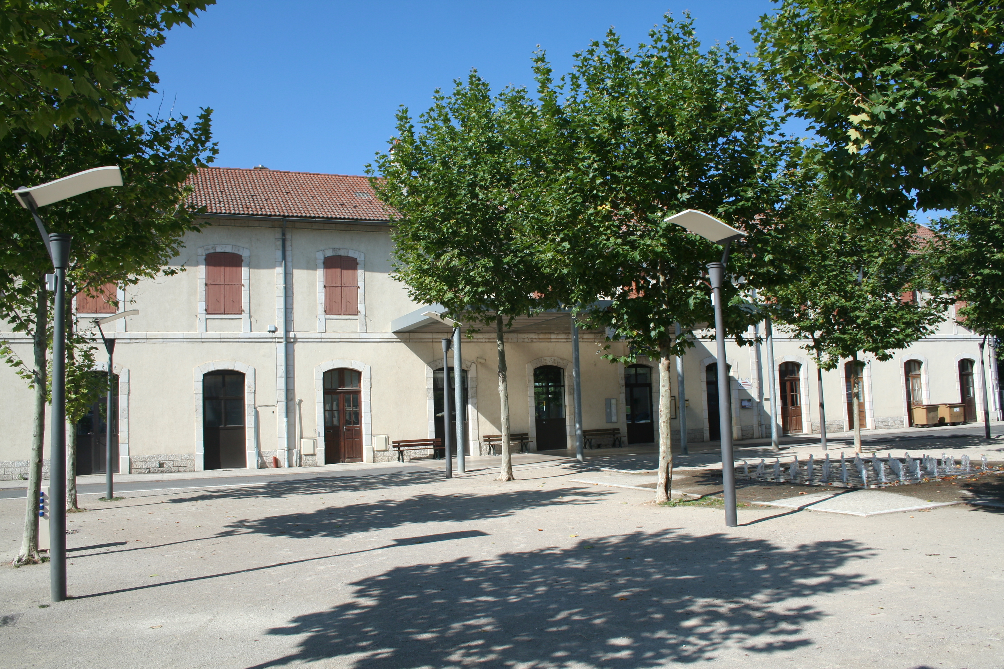 Sévérac-le-Château (Aveyron) - gare.